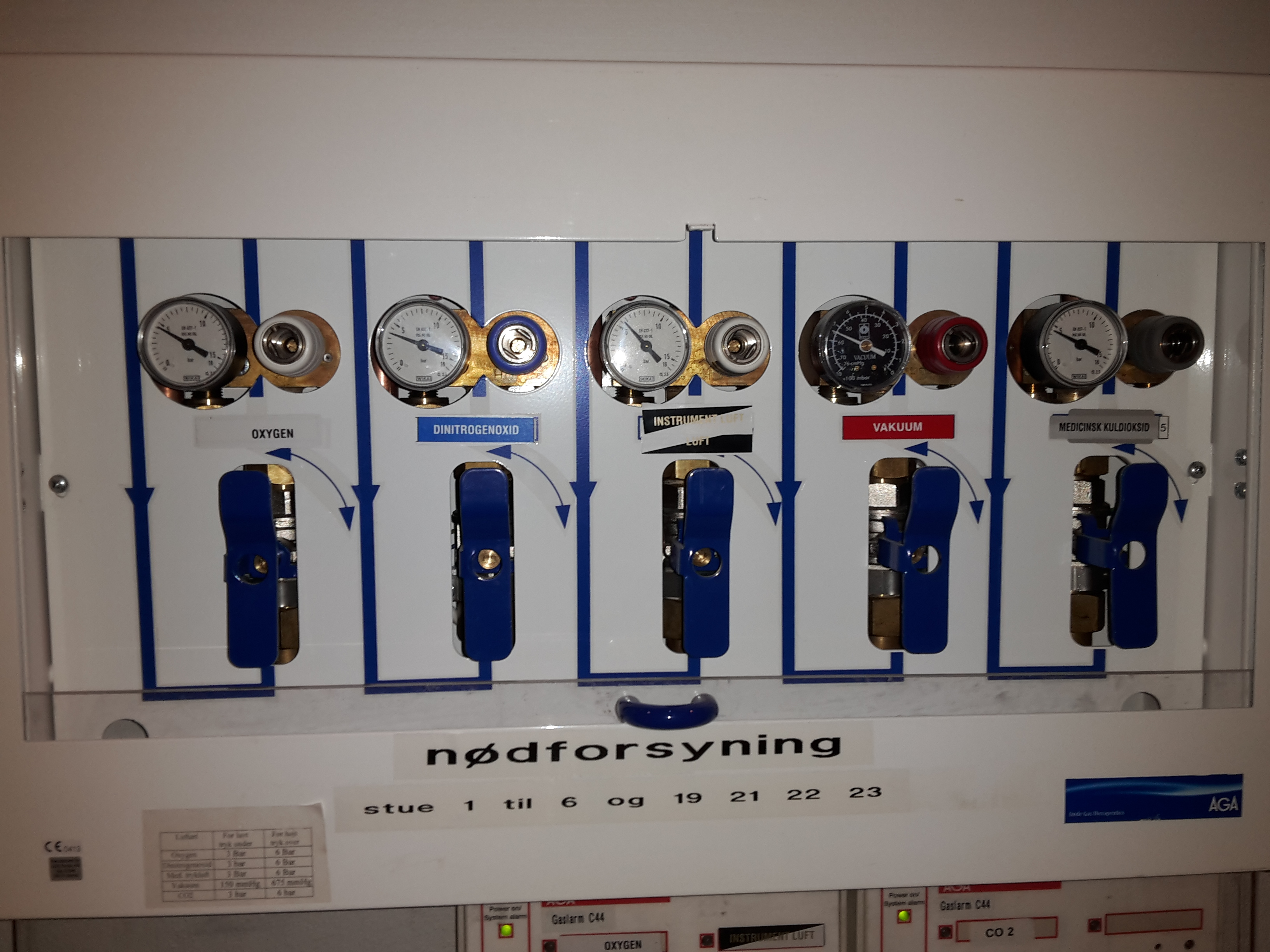 Udtage